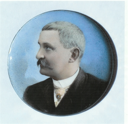 Ciurkusdirektören John Madigan. Handkolorerad fotomedaljong som tillhört hustrun Laura Madigan.